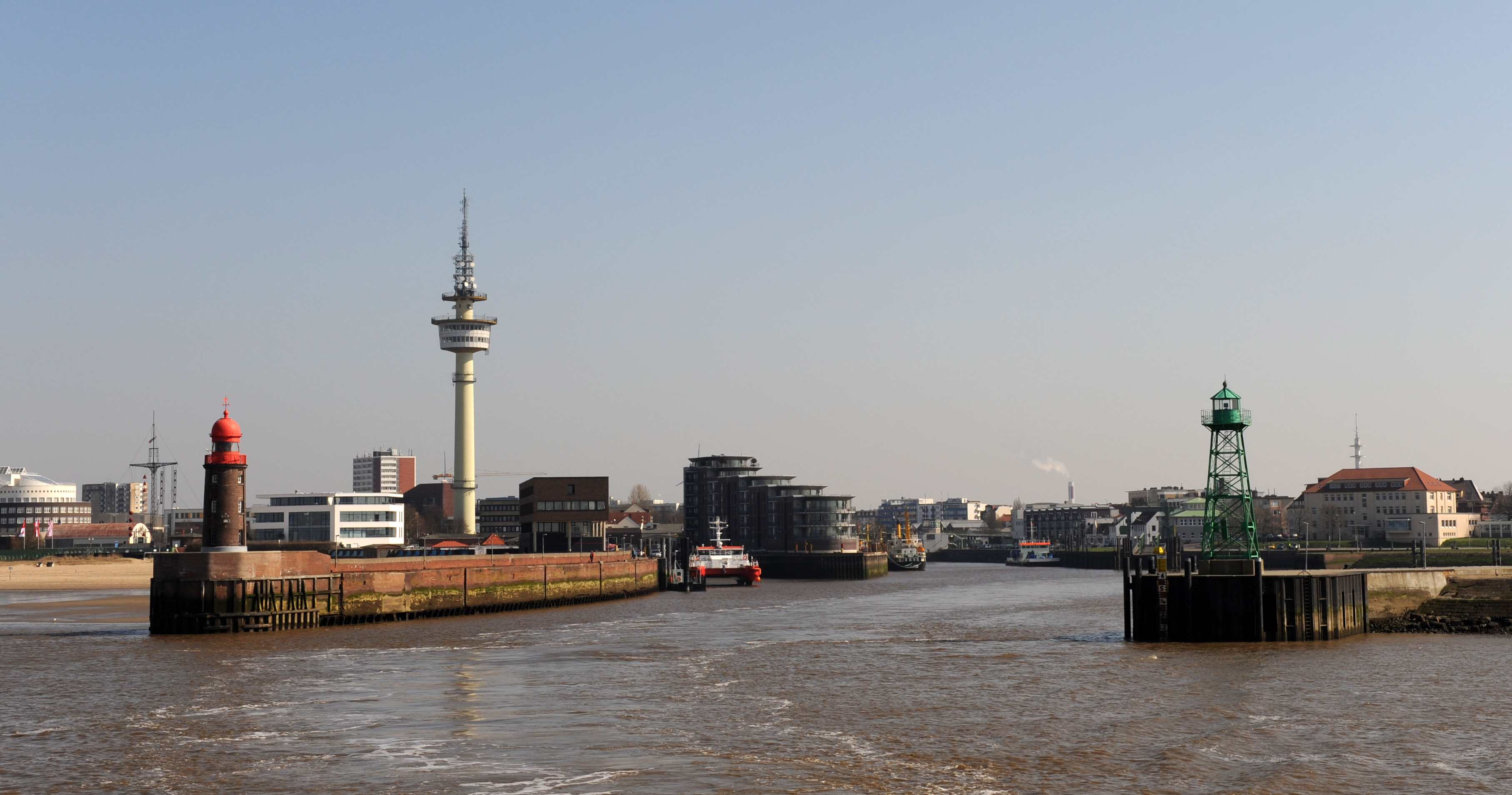 Port/outlet of river Geeste into river Weser, Bremerhaven, northern Germany with Einfahrtsfeuer Nordfeuer, rot, erbaut 1914, Höhe 14 m, Nenntragweite 5 sm, Bauart: Ziegelturm, Internationale Ordnungsnr.: B1274 Südfeuer, grün, erbaut 1924, Höhe 14 m, Nenntragweite 5 sm, Bauart: Metallgitterturm, Internationale Ordnungsnr.: B1275